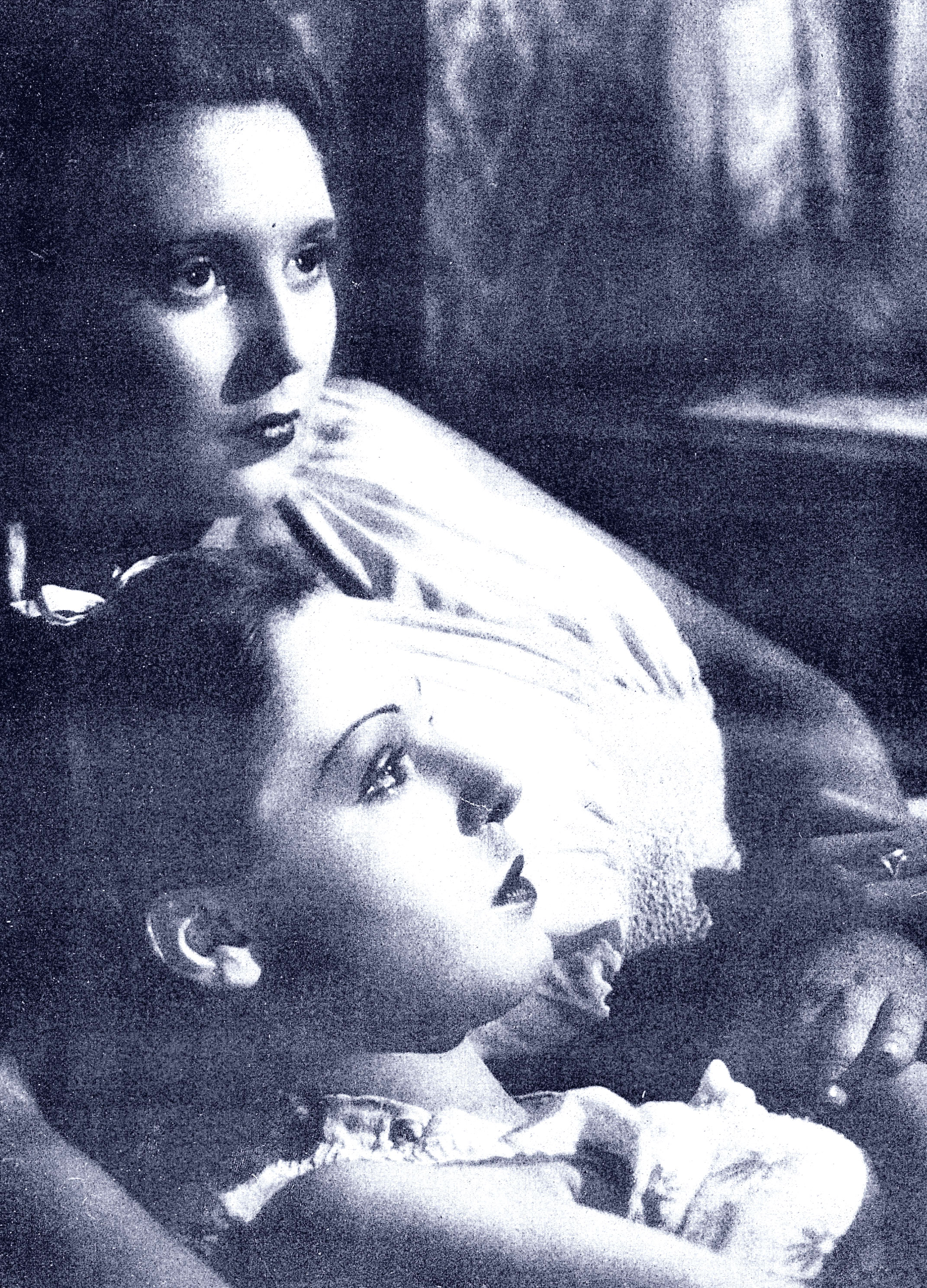 Chiaretta Gelli ed Anna Vivaldi/Proclemer ne "Il birichino di papà" (Matarazzo, 1943)